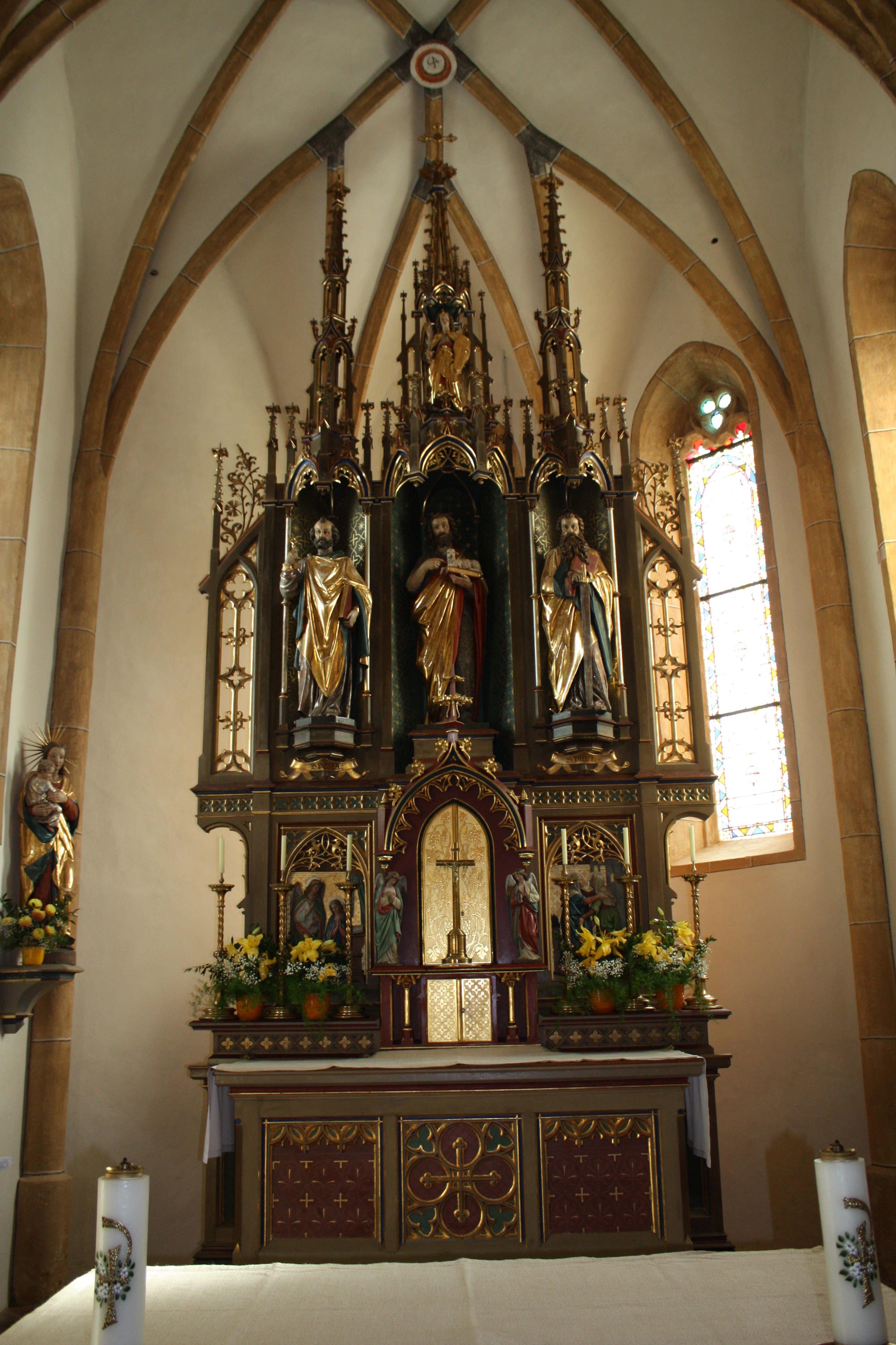 Kath. Pfarrkirche hl. Johannes der Täufer